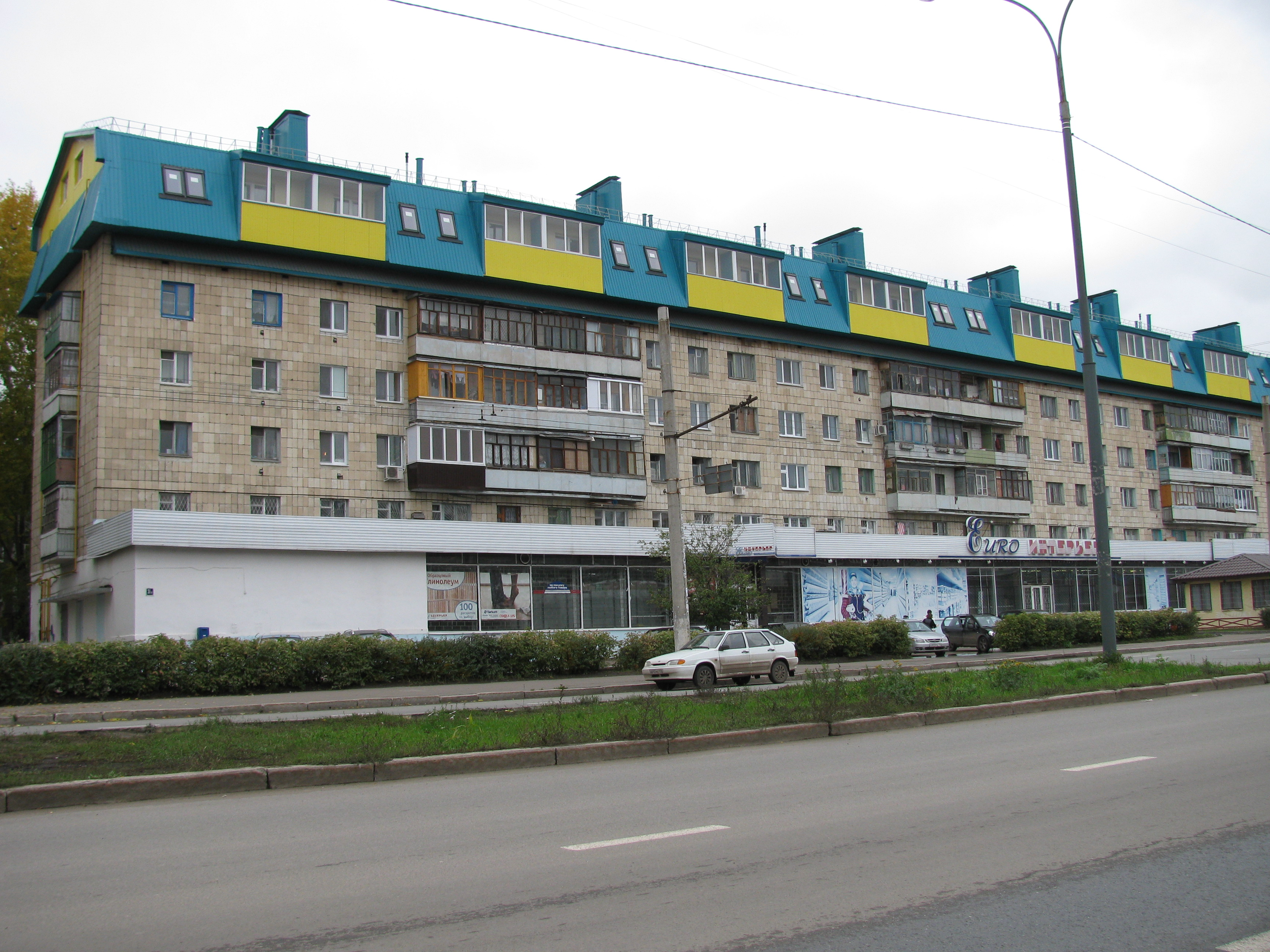 "Модернизированная хрущёвка" в Казани